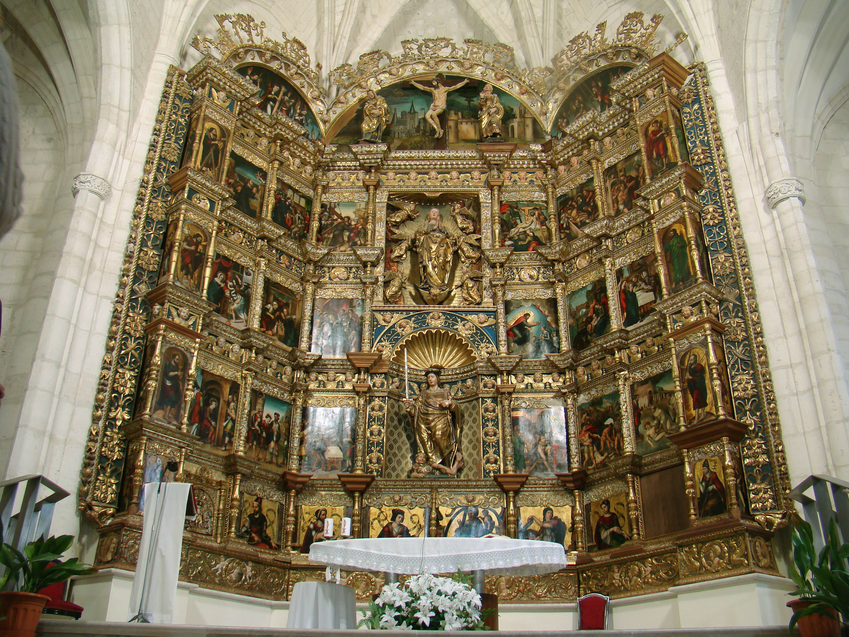 Iglesia de San Pelayo en Olivares de Duero (Valladolid, España). Estilo gótico, segunda mitad del siglo XV. Retablo de San Pelayo. Pinturas sobre tabla de Juan de Soreda. Ensamblador, Pedro de Guadalupe, Calvario de Alonso Berruguete